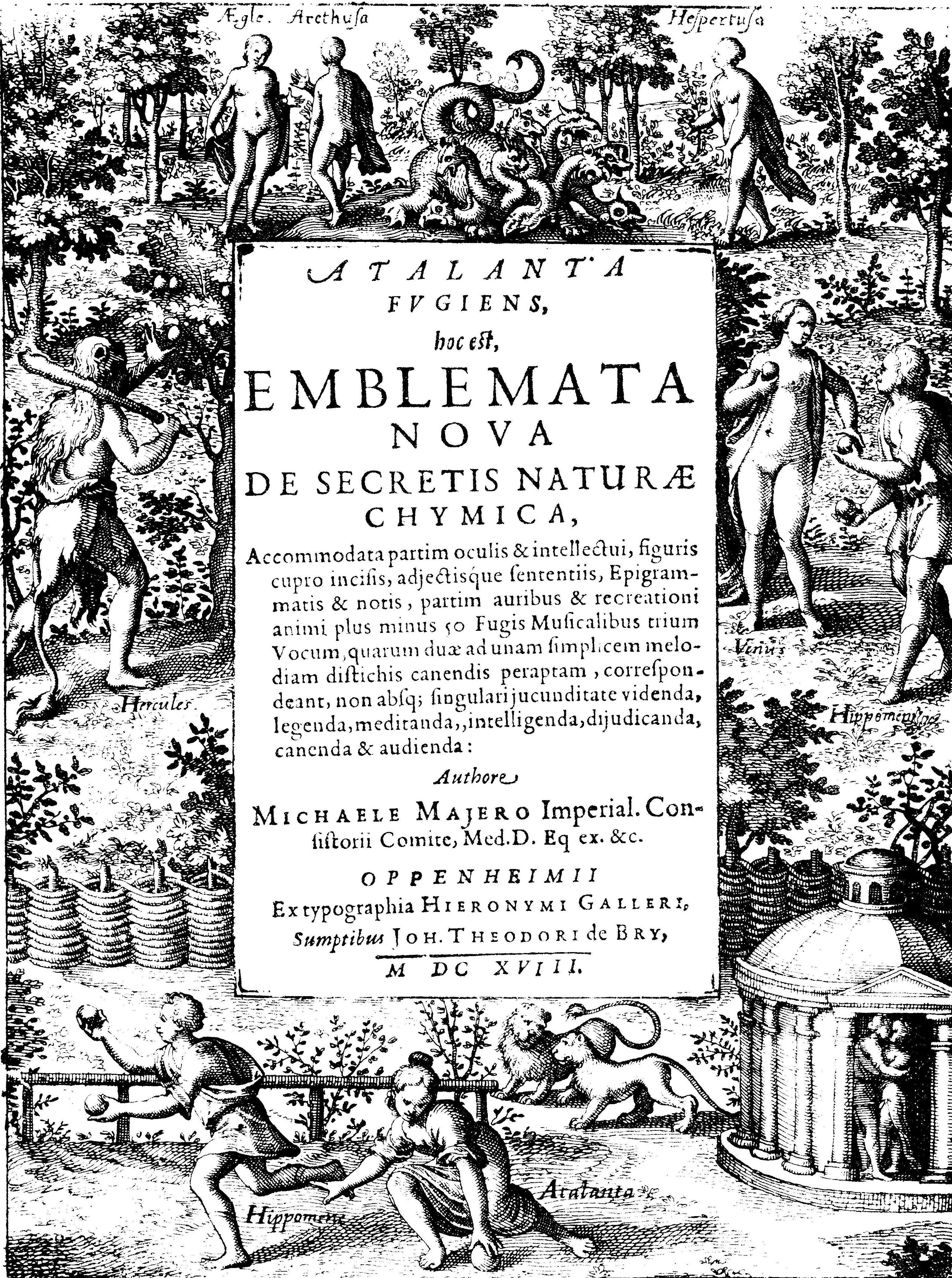 Gestochenes Titelblatt des Buches "Atalanta Fugiens, hoc est, Emblemata nova de secretis Naturae chymicae. Oppenheim 1618.